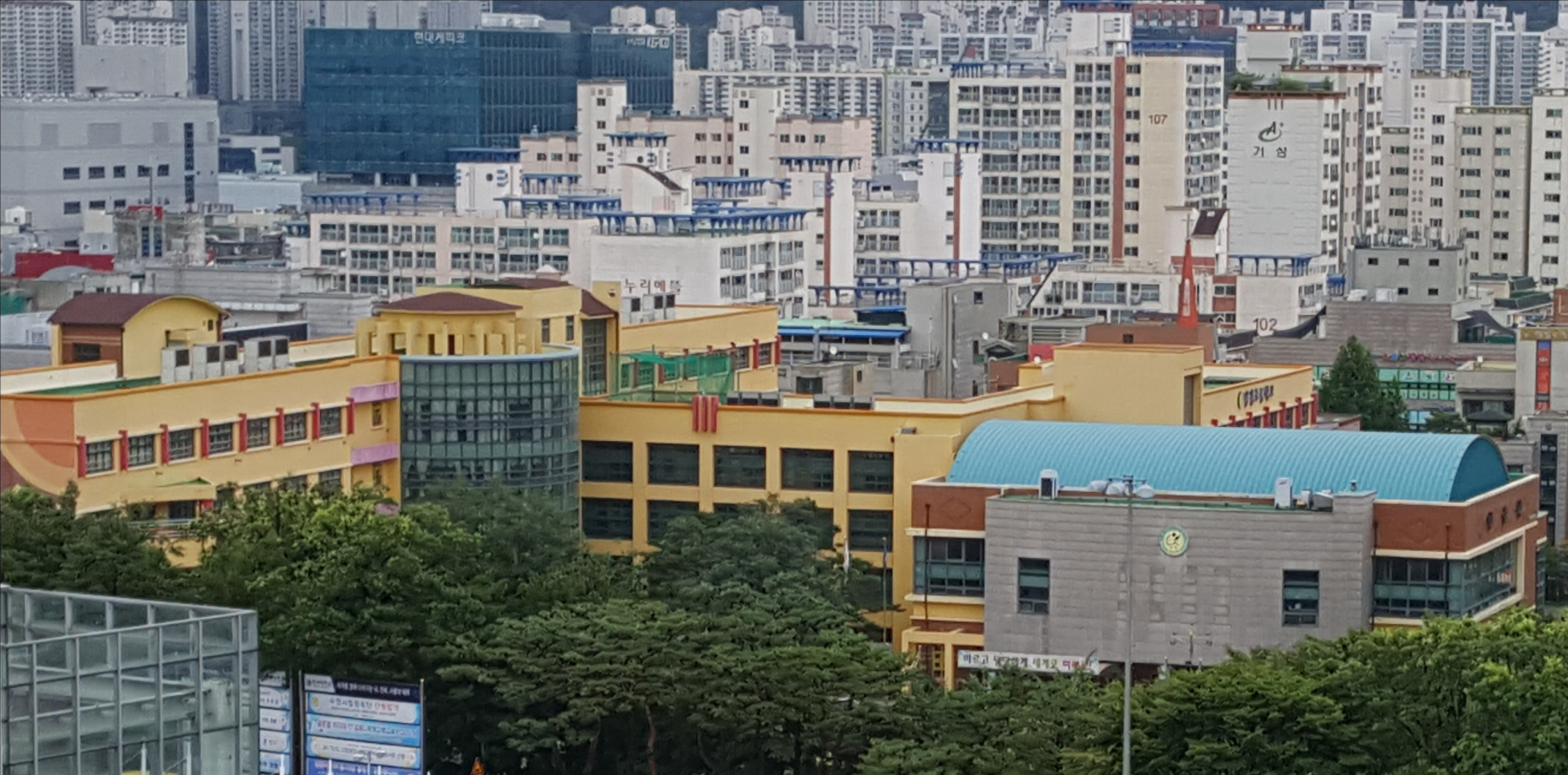 한세대학교 뒤에 보이는 당정초등학교